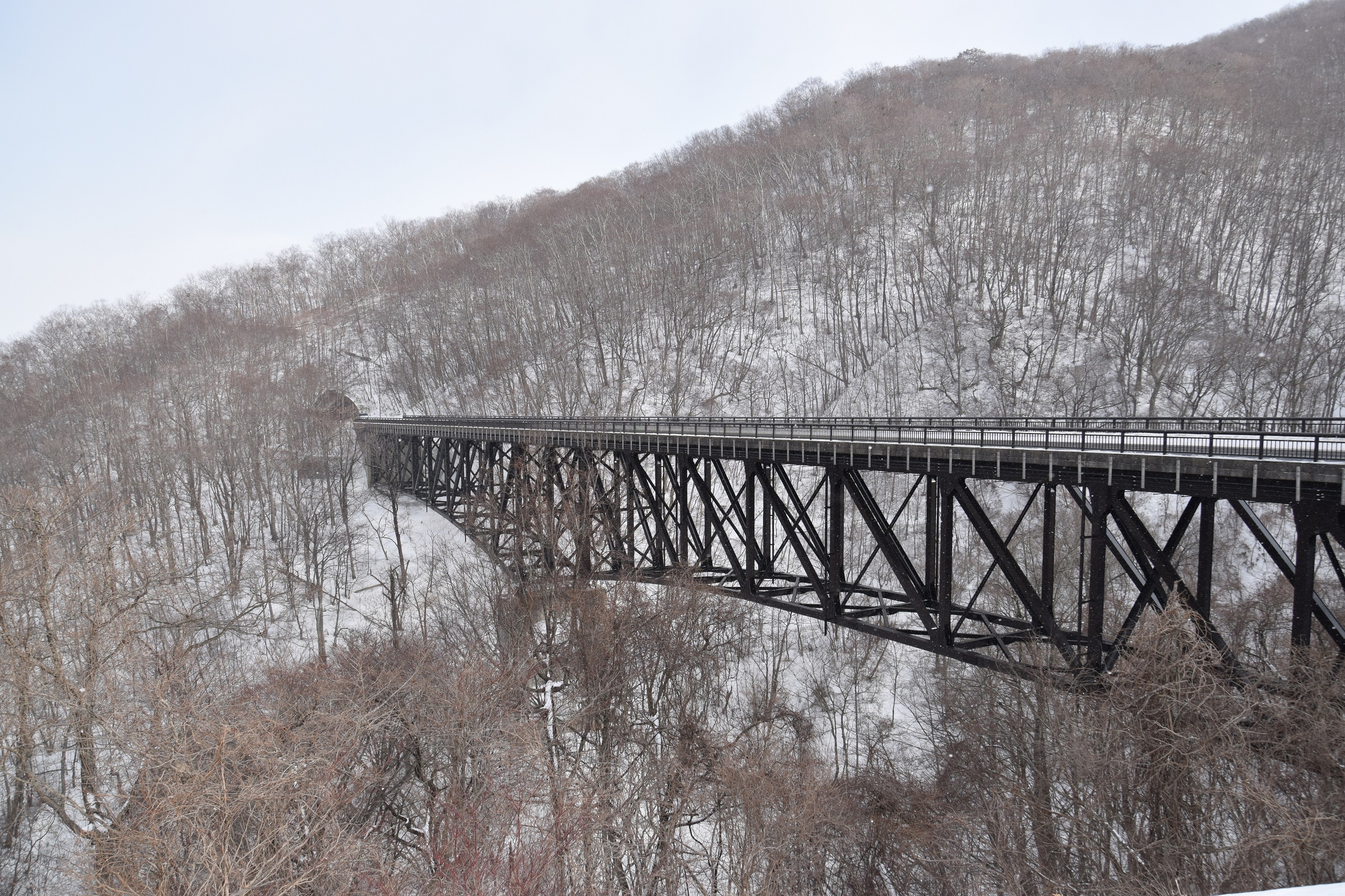 国道289号（甲子道路）第1剣桂橋。福島県西白河郡西郷村（2019年1月27日）。 後方に写るトンネルは剣桂トンネル。 Nikon D5300